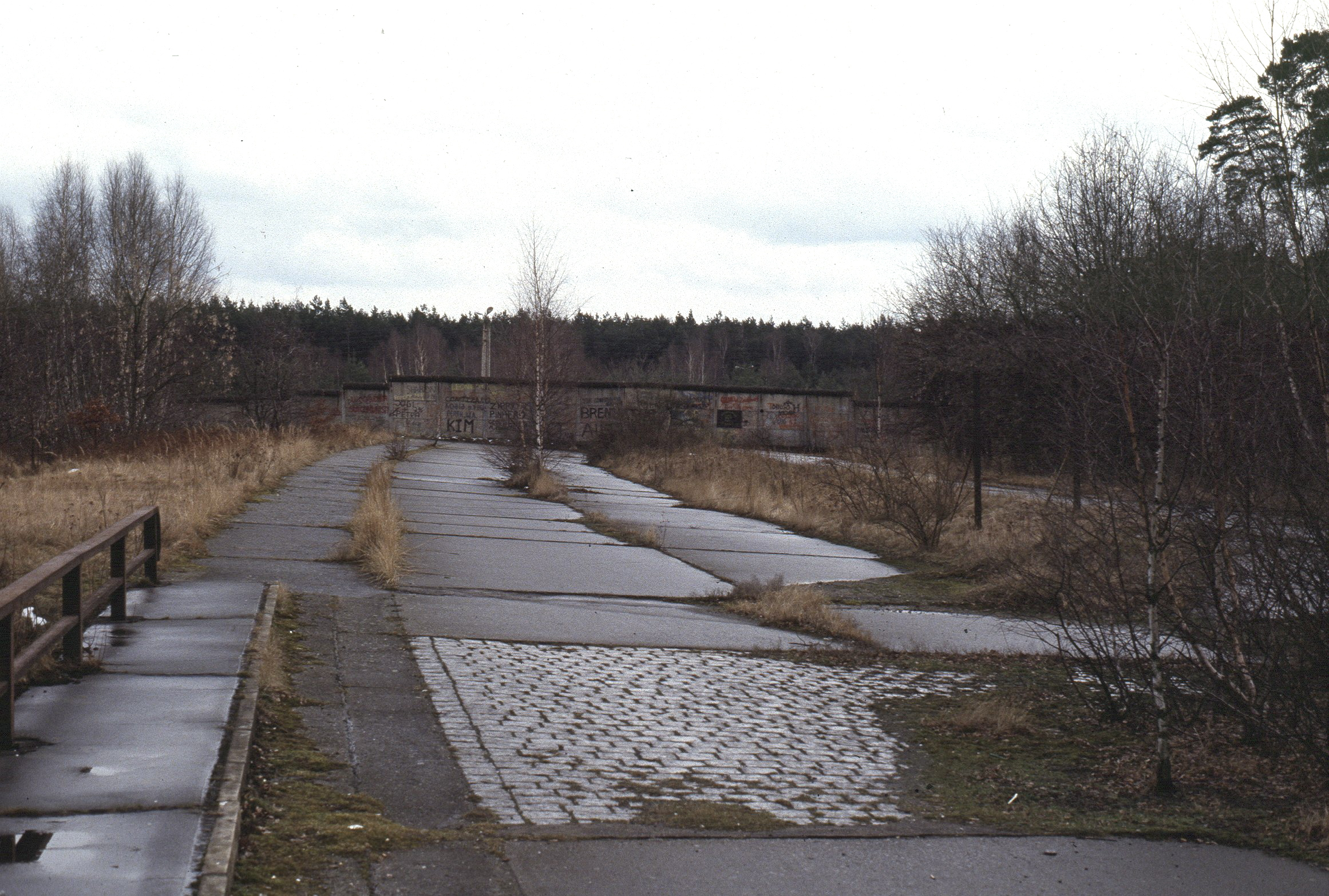 Unterbrochene ehemalige Autobahn bei Albrechts Teerofen